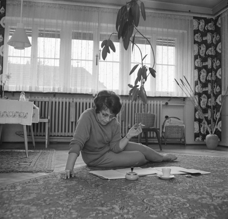 Zentralbild/Frotscher 5.3.1964 Romanschriftstellerin Hildegard Maria Rauchfuß ... auch Lyrikerin und Fernsehspielautorin, in ihrem Heim. Sie wurde am 22.2.1918 in Breslau geboren